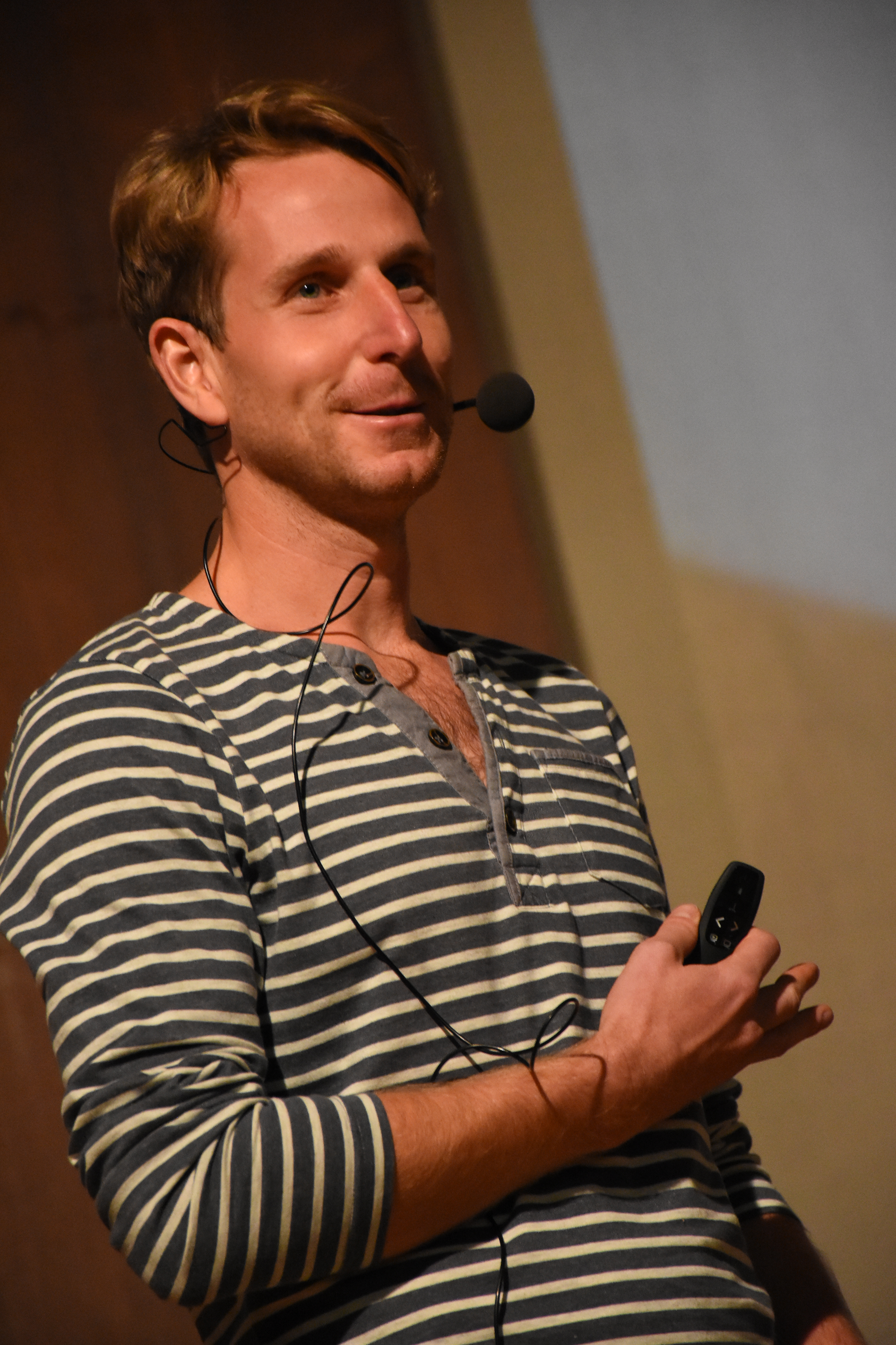 Michal Doležel na Sjezdu (nejen) evangelické mládeže v Třebíči